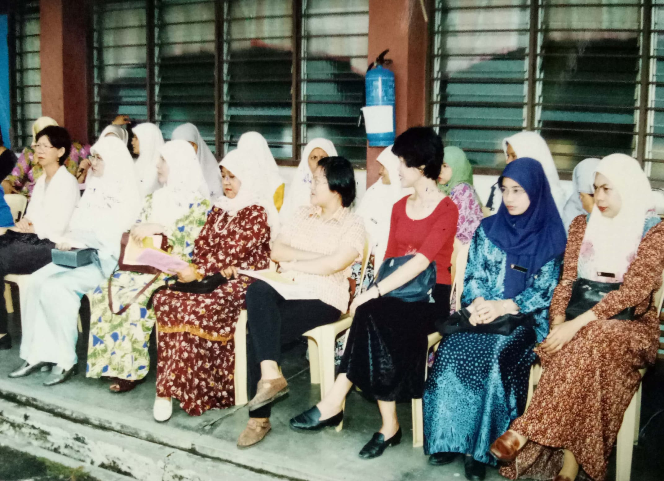 tempat duduk guru lama